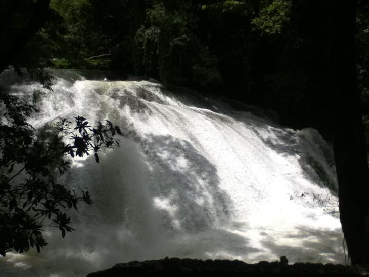 Balneario "Cascadas de Agua Blanca" en la reserva ecológica estatal del mismo nombre, en el municipio de Macuspana, estado de Tabasco, México.